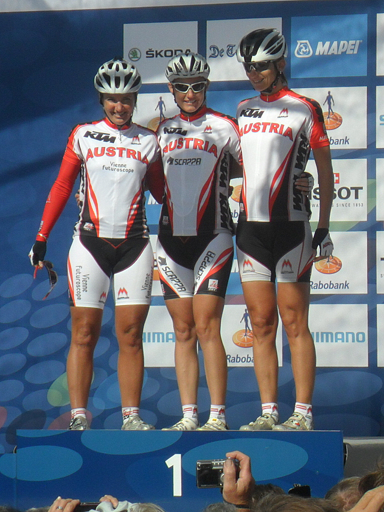 Ploegenpresentatie Oostenrijk voor de start van het Wereldkampioenschap 2012 in Valkenburg, Nederland.